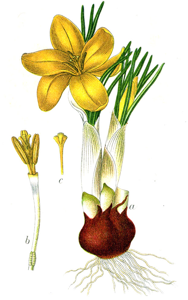 Crocus flavus subsp. flavus, syn. Crocus luteus Lam. (1791) Original Caption Gelber Safran, Crocus luteus